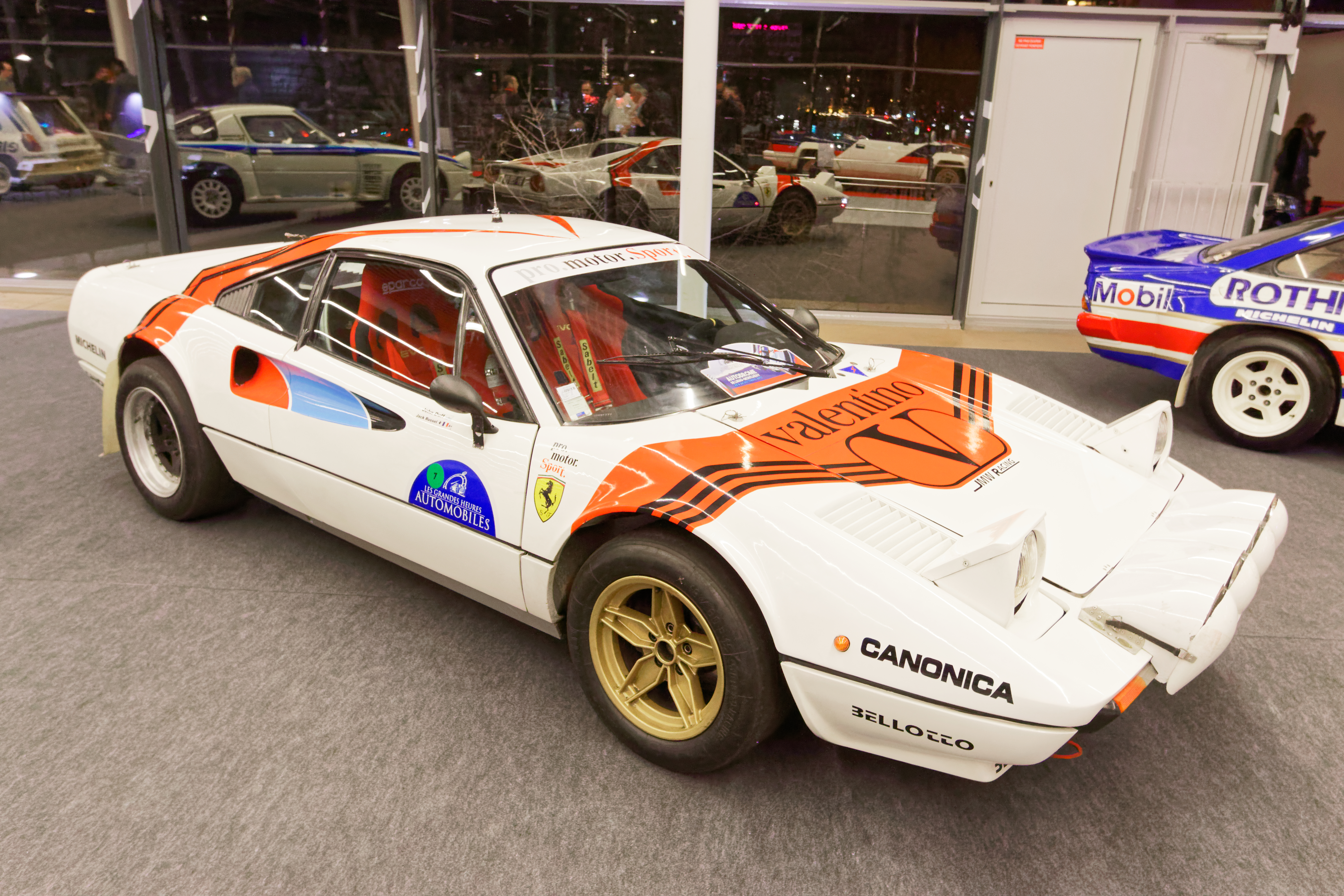 Une Ferrari 308 GTB Michelotto groupe B de 1984 exposée lors du salon Rétromobile 2017.